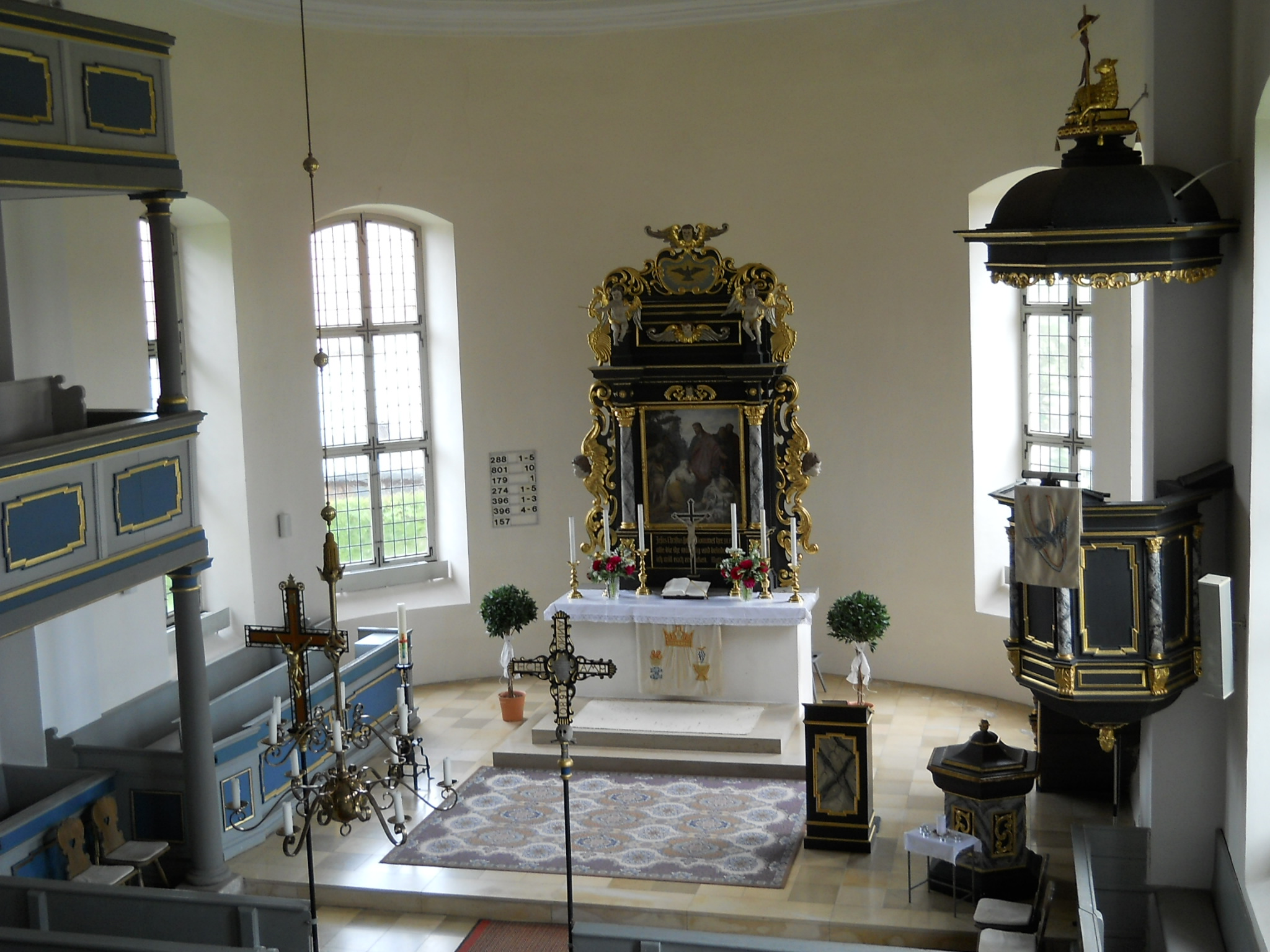 Inneres der Markgrafenkirche in Aha, einem Ortsteil von Gunzenhausen im fränkischen Landkreis Weißenburg-Gunzenhausen